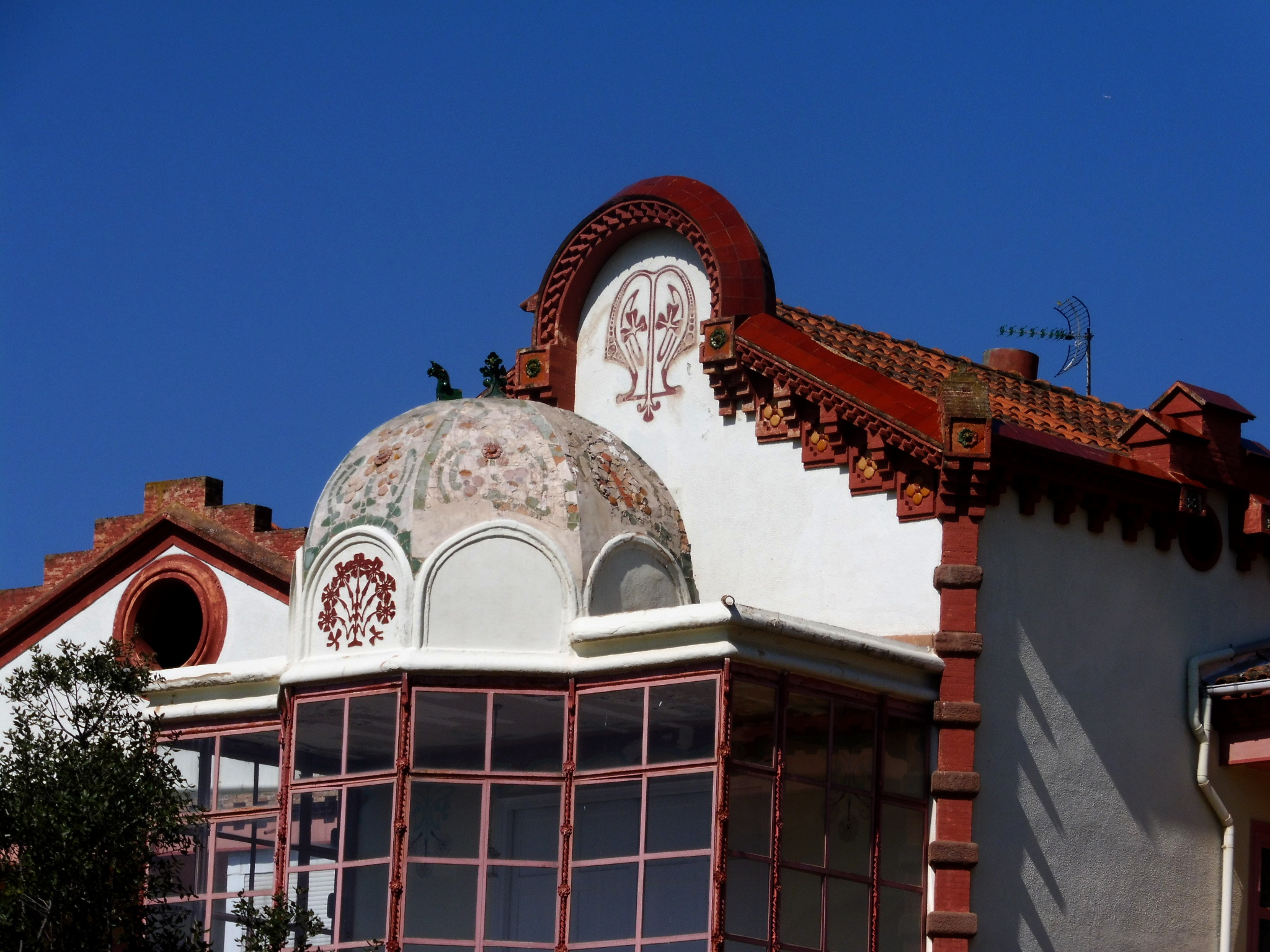 Mas de la Morera (Manresa): detall de la decoració